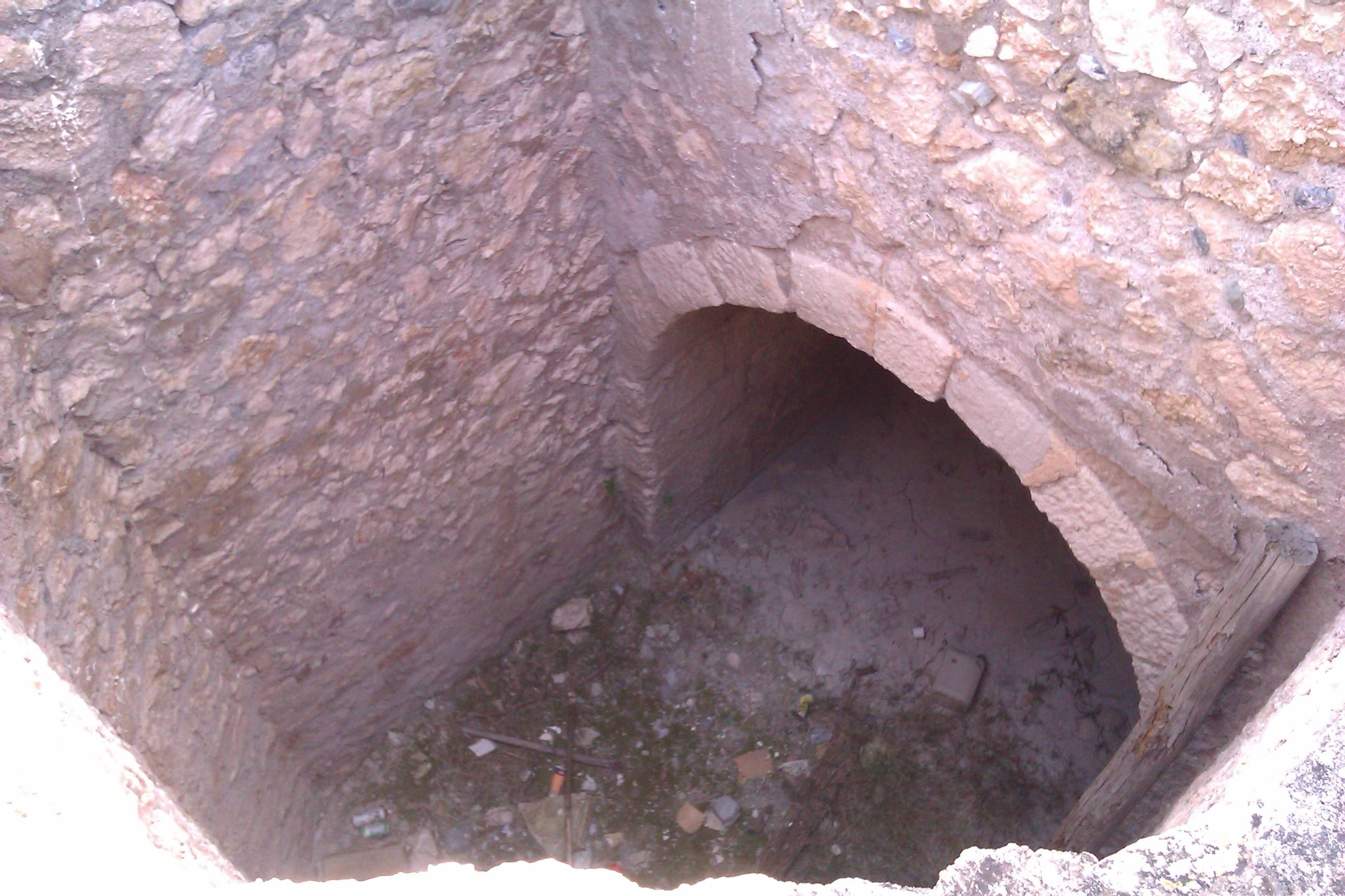 Vista de túnel por donde se evacuaba el agua después de caer sobre las aspas que movían las piedras del Molino de Béjar II